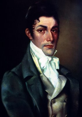 Retrato al óleo de Martín de Álzaga